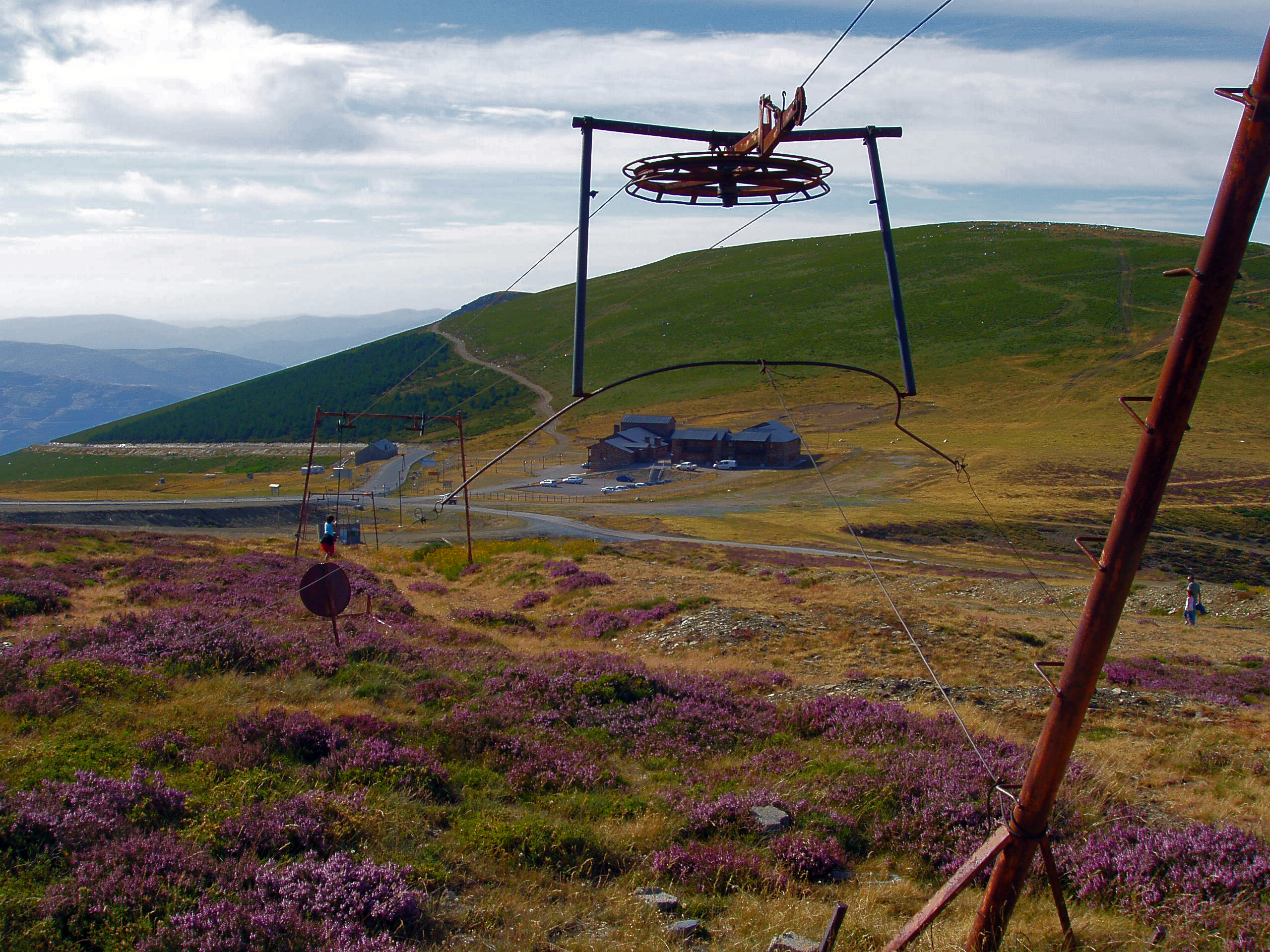 Cumbre del puerto de montaña Casa la Cueva en la comarca leonesa d La Cabrera.